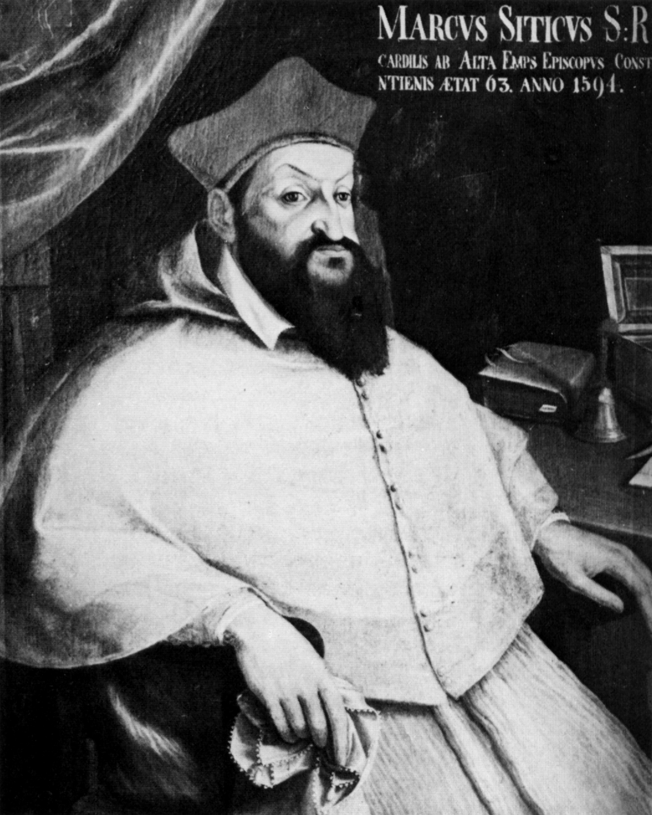 Kardinal Markus Sittikus von Hohenems. Gemälde, Öl auf Holz, Museum Polička